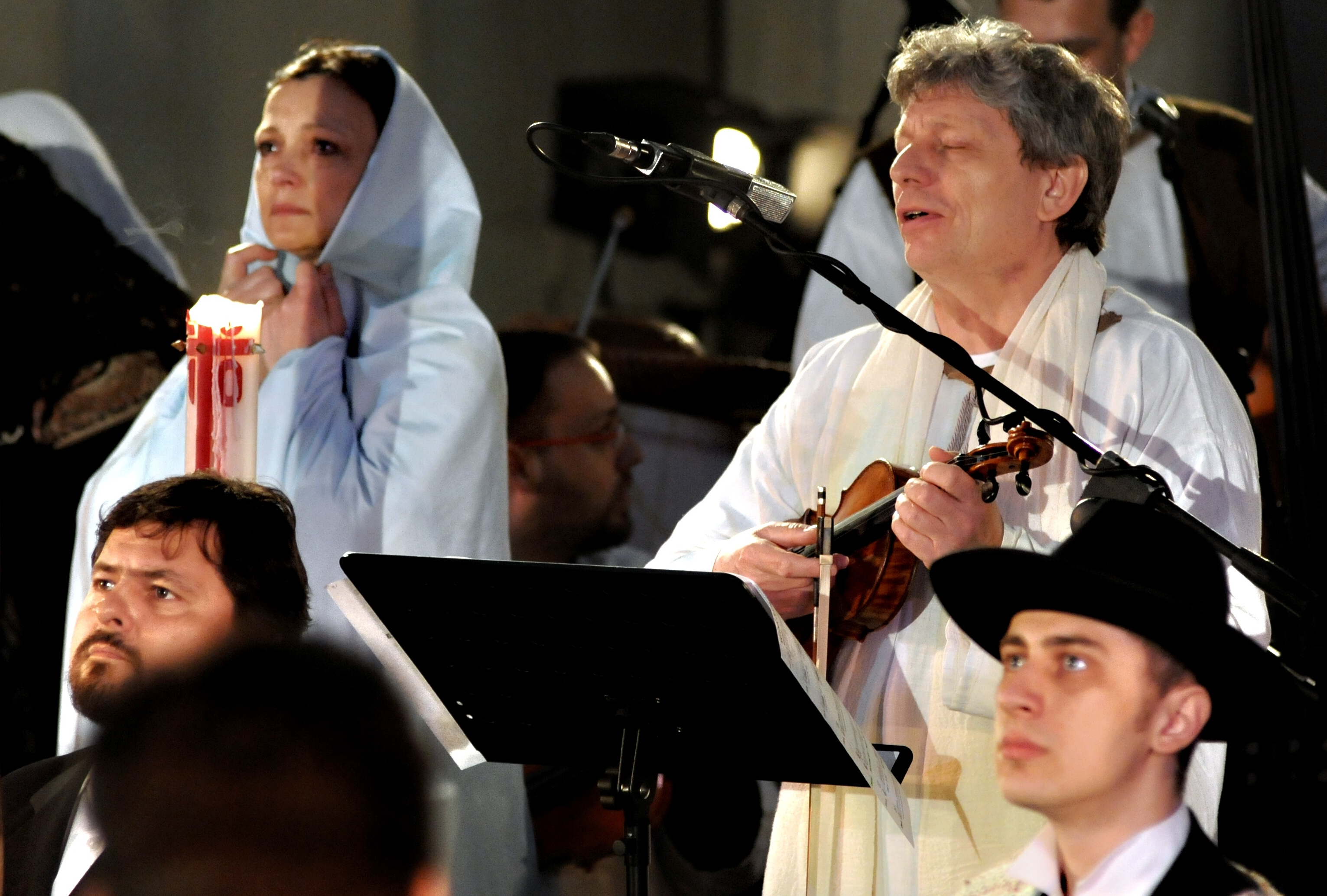 Bohumila Fišarová jako Panna Marie a Jiří Pavlica jako Ježíš Kristus v oratoriu Pavla Helebranda Evangelium podle houslí